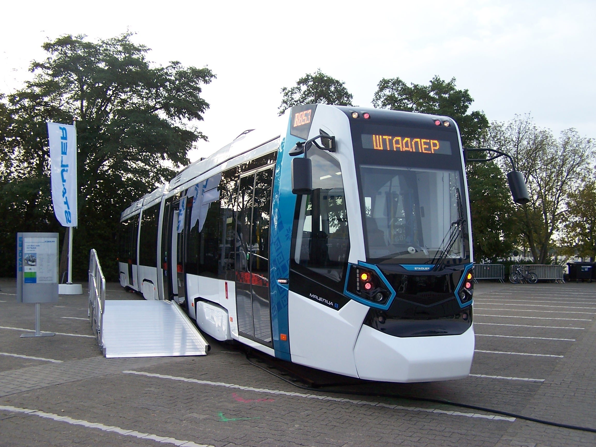 Stadler Metelitsa auf der Innotrans 2014